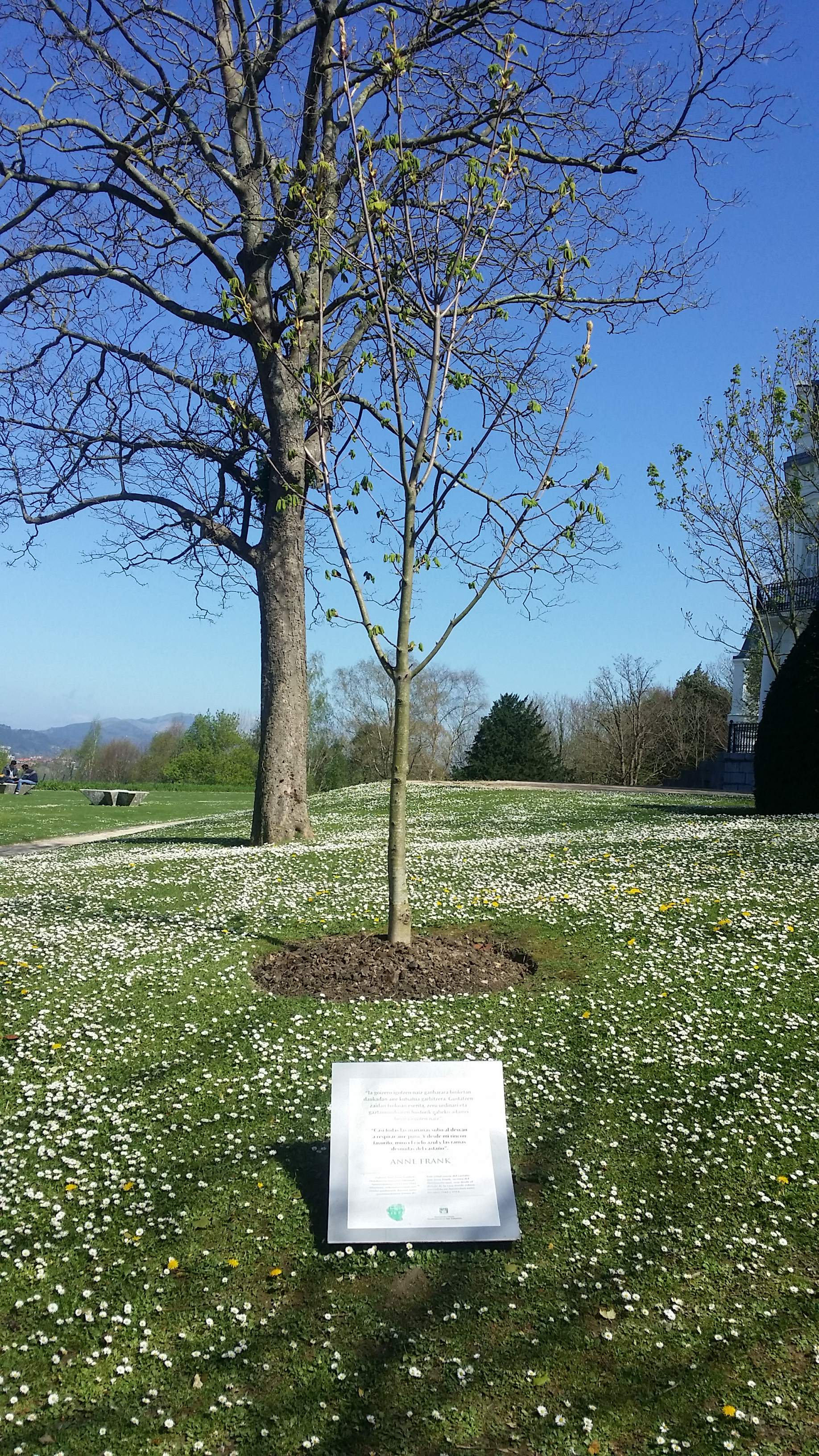 Anne Franken gaztainondoaren kimua Aieteko parkean.